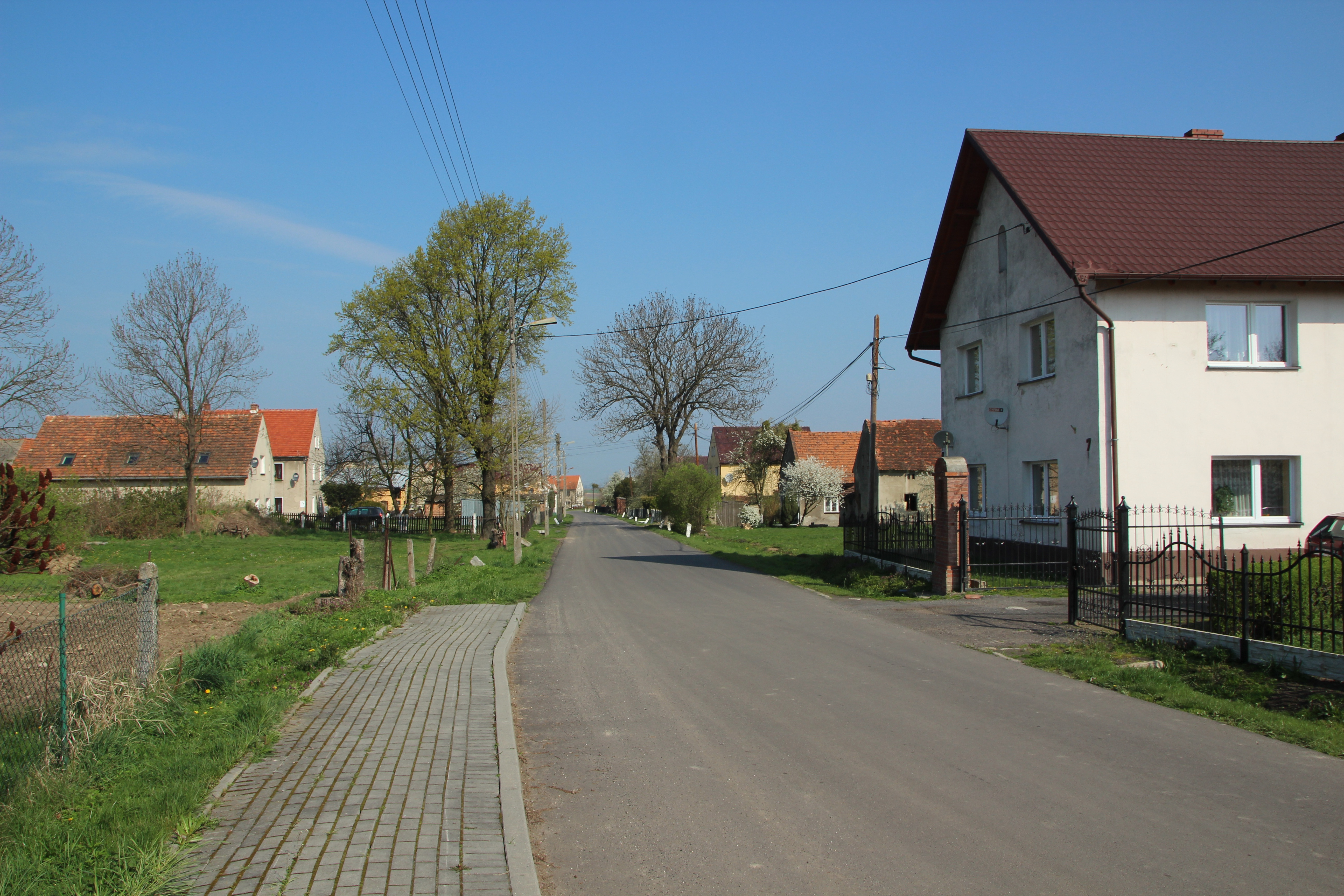 Kuropas – wieś w Polsce położona w województwie opolskim, w powiecie nyskim, w gminie Korfantów.